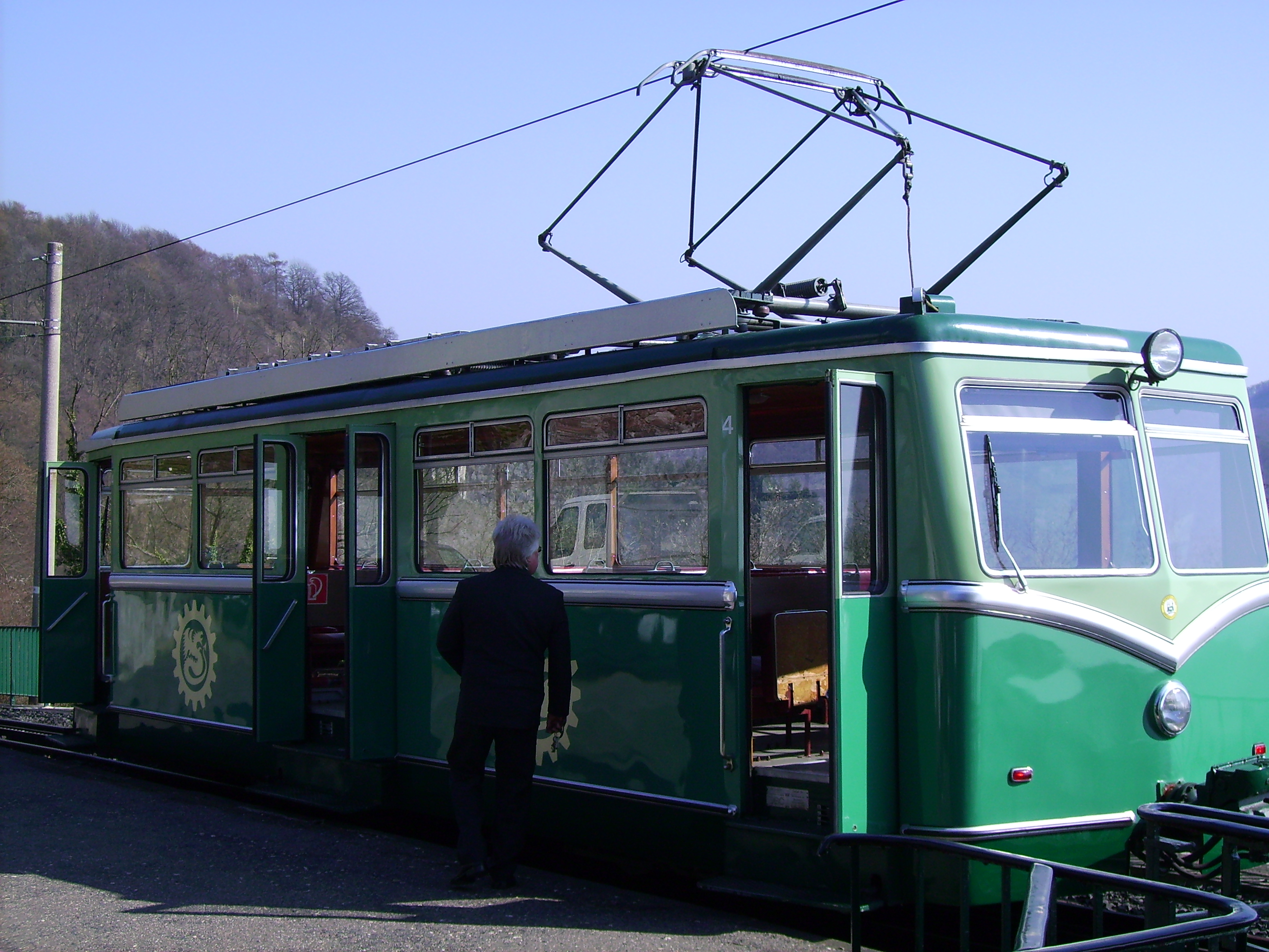 Triebwagen Nummer 4 der Drachenfelsbahn, Endhaltestelle